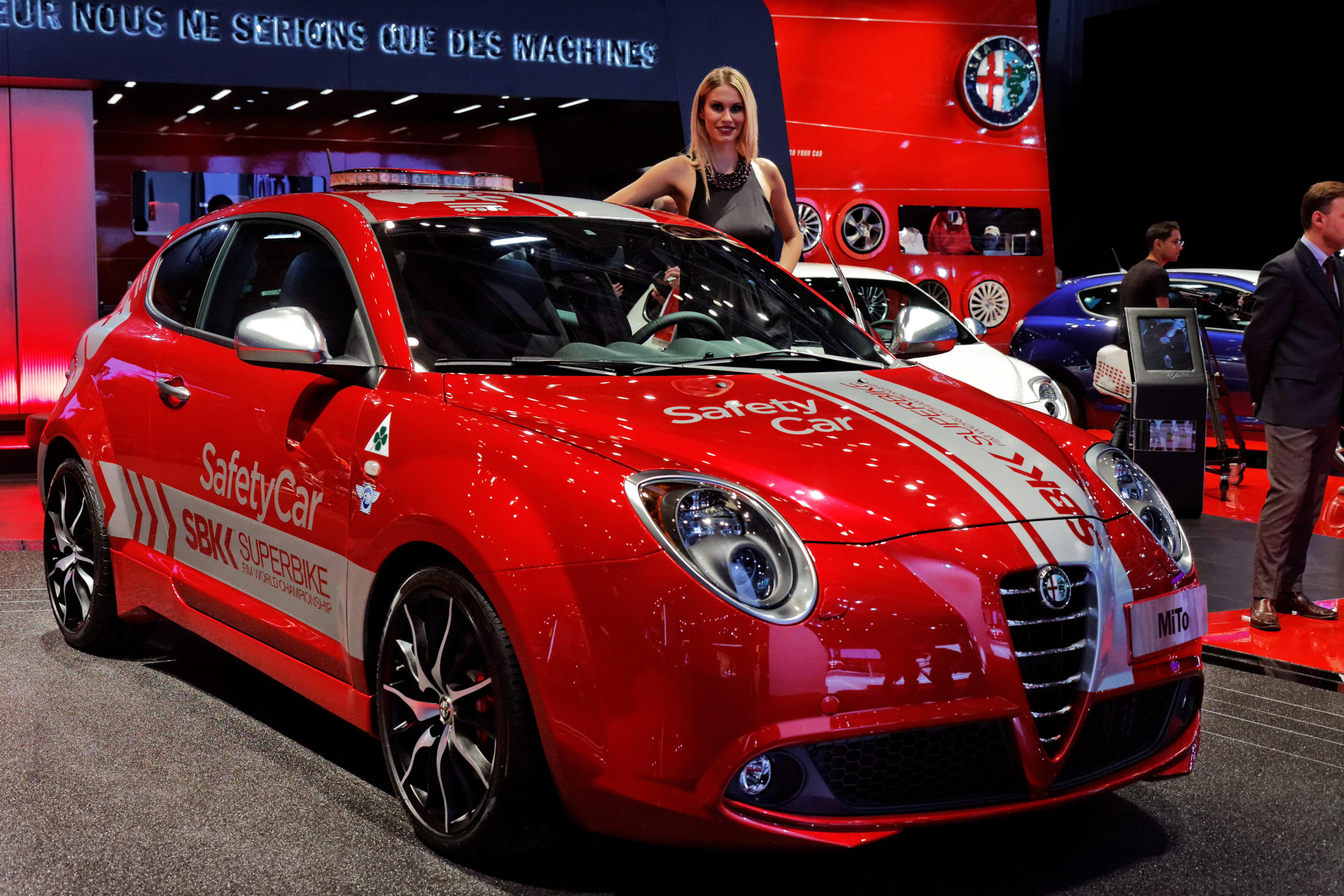 L'Alfa Romeo MiTo présentée lors du Mondial de l'Automobile de Paris 2012.